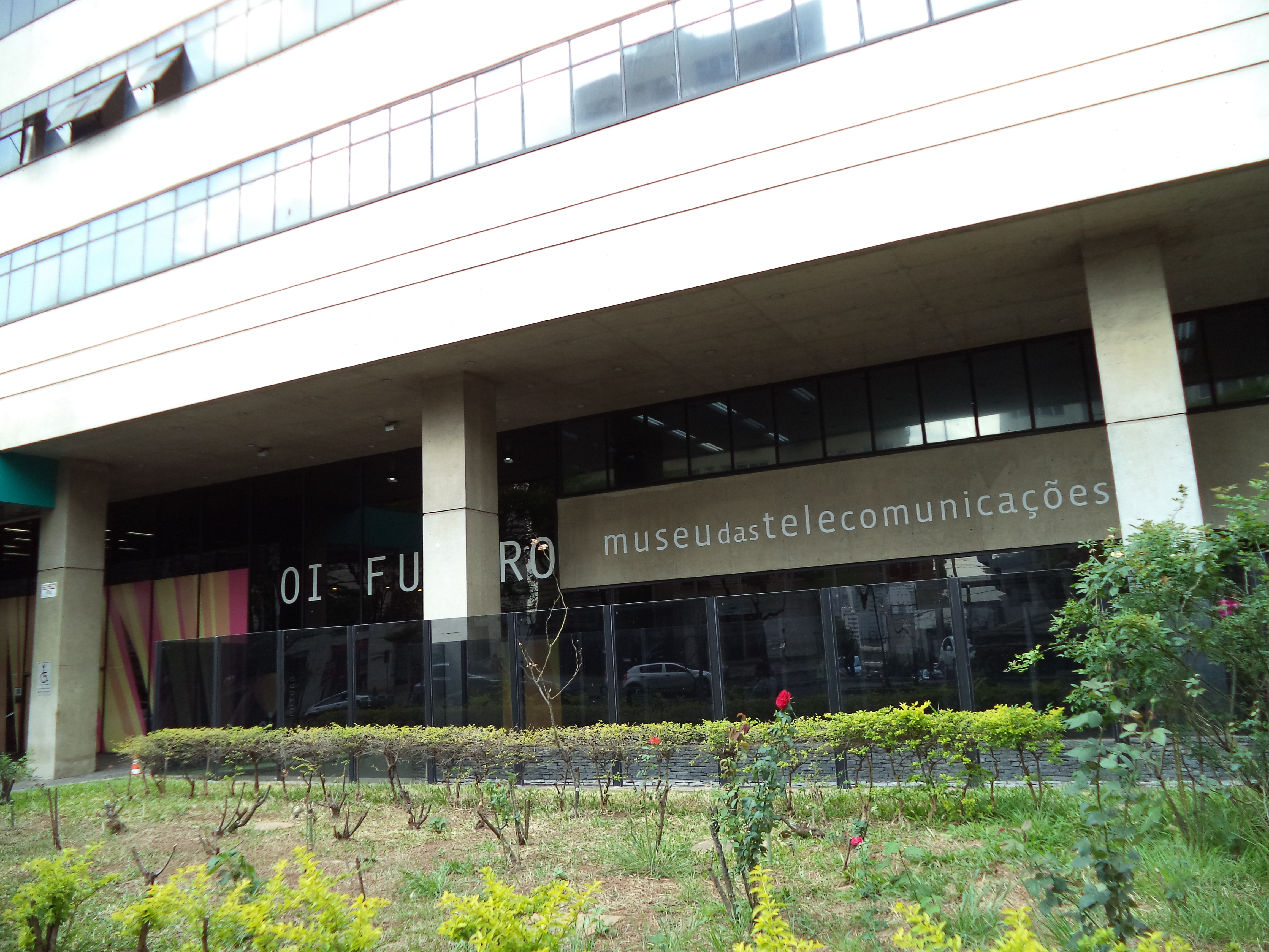 Entrada do Museu das Telecomunicações, em Belo Horizonte, Minas Gerais, Brasil.